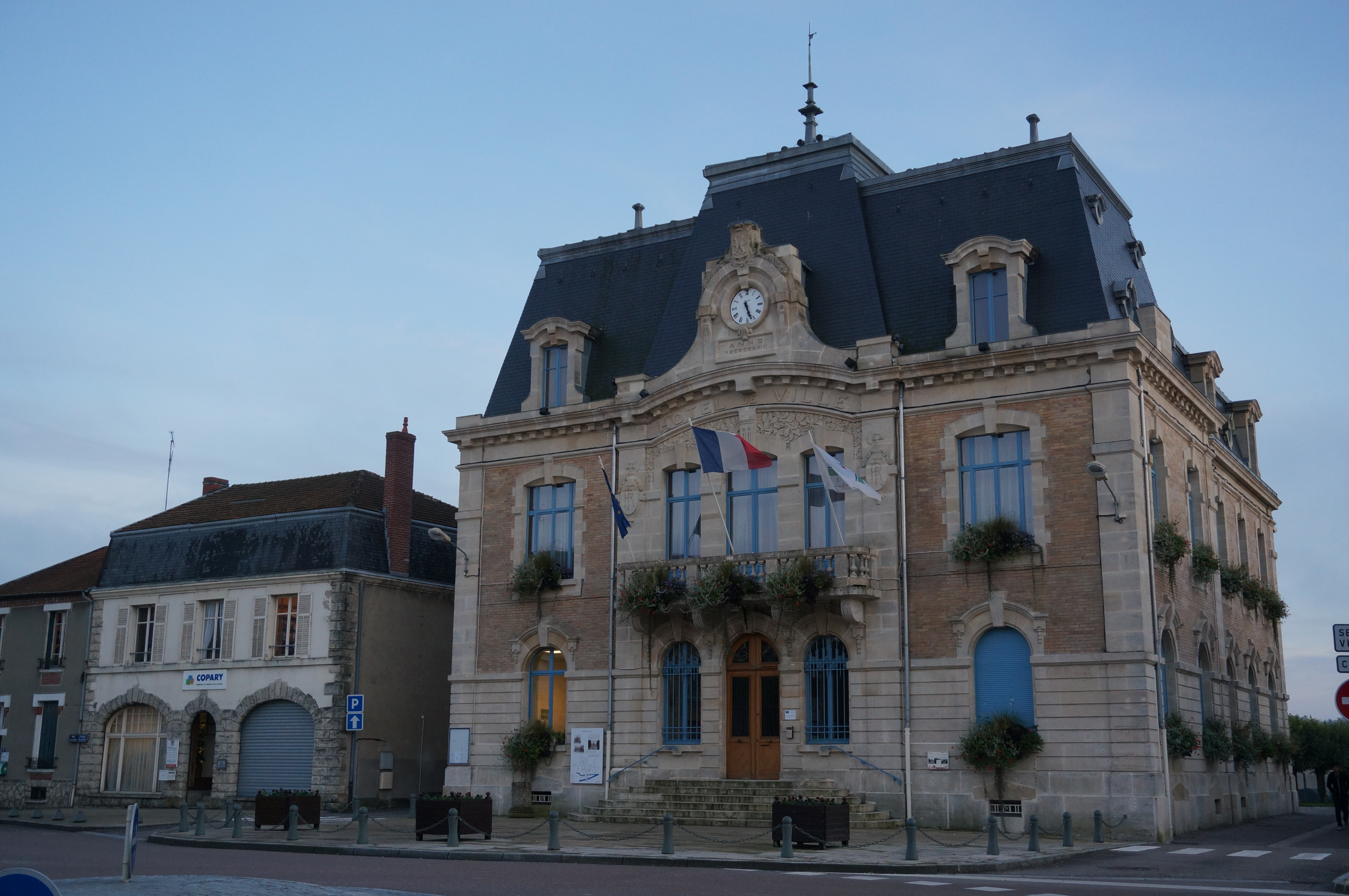 à Revigny-sur-Ornain.